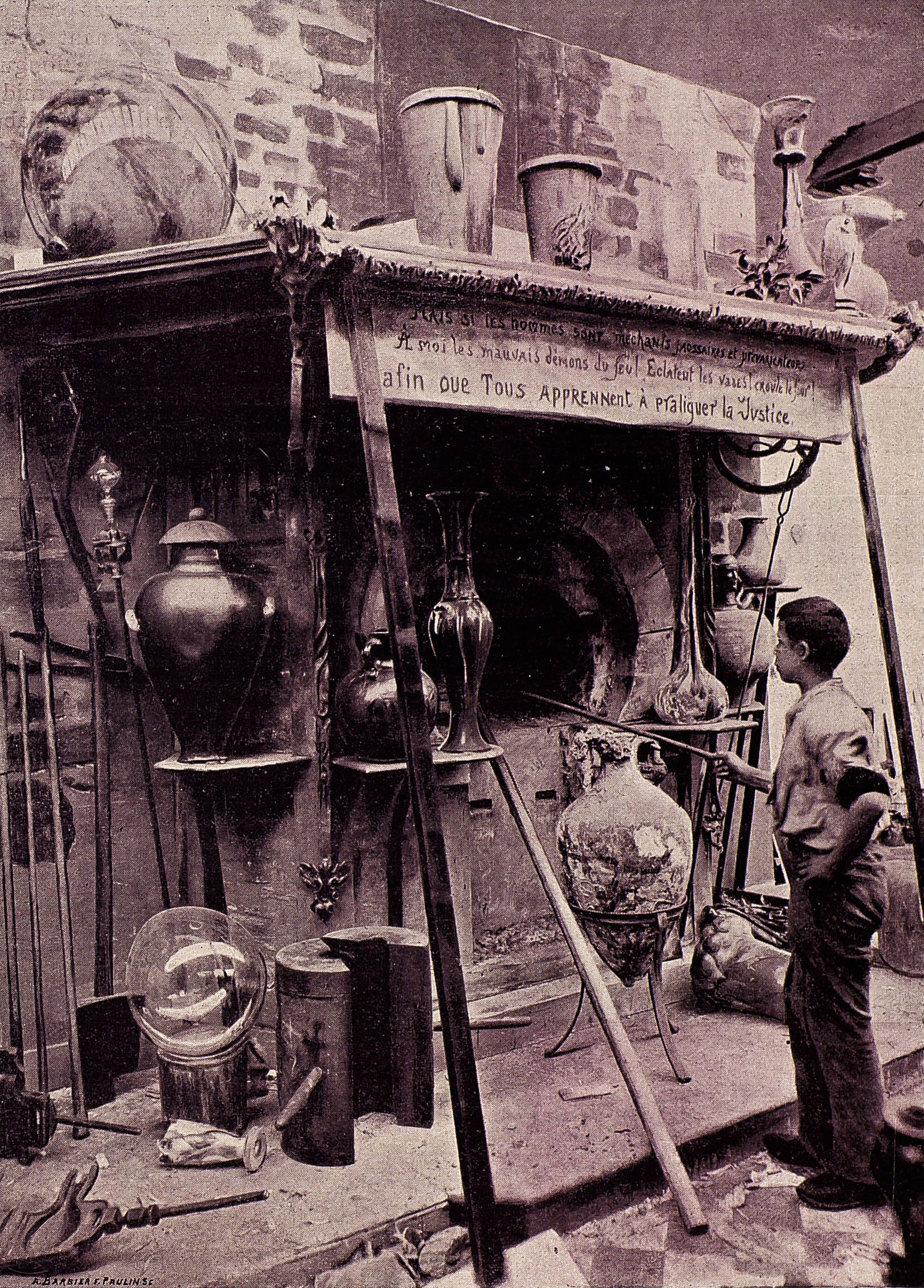 Extrait de La Lorraine artiste du lundi 1er octobre 1900, fascicule n° 6, p. 89